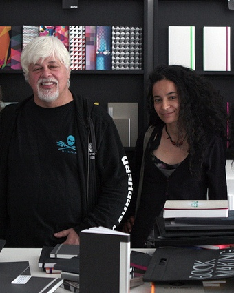 Paul Watson, Lamya Essemlali, Francfort (27 juin 2012).